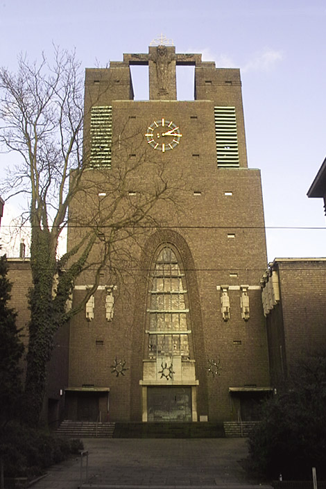 Josef Frank - Heilig Kreuz Church - Gelsenkirchen